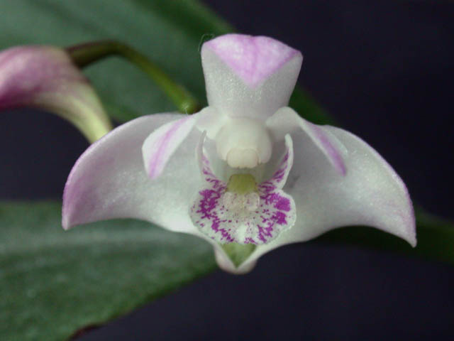 Beschreibung: Dendrobium kingianum Quelle: fotografiert am 03.05.2004 Fotograf: Wolfgang Apel 18:35, 13. Nov 2004 Toapel 640 x 480 (38972 Byte) (Lizenzstatus "GNU-FDL")